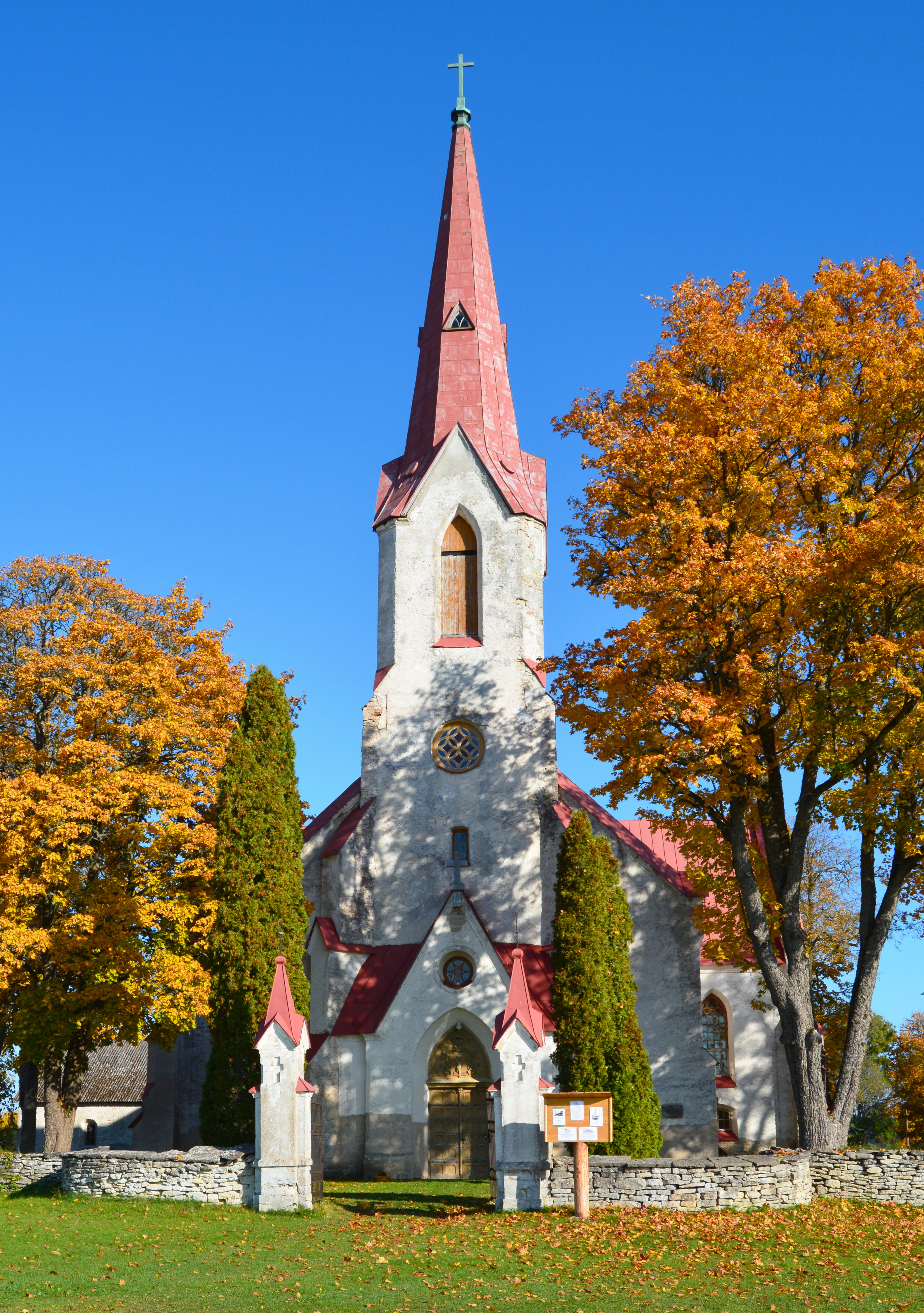 Ristkülikukujuline, neogooti stiilis, krohvitud paekivihoone, kõrge 42.4m torniga.